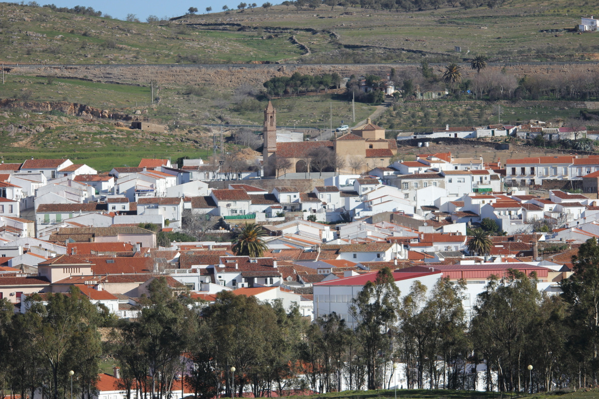 Guadalcanal